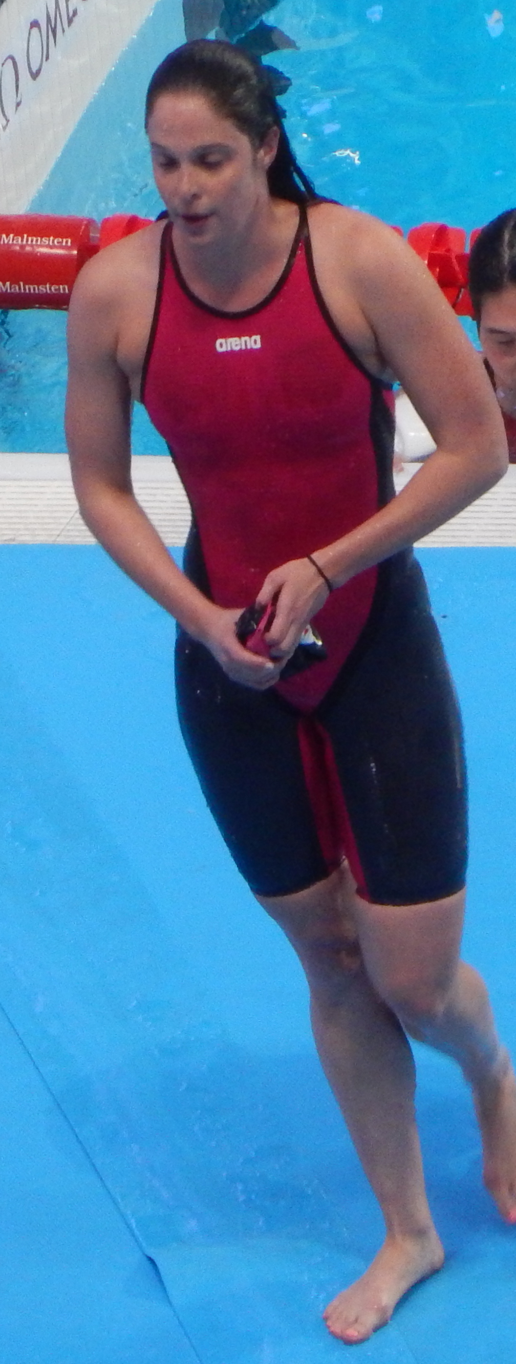 Камил Адамс на чемпионате мира в Казани